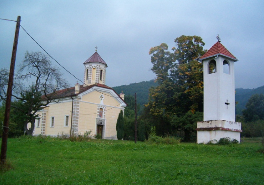 Црква у Јелашници.